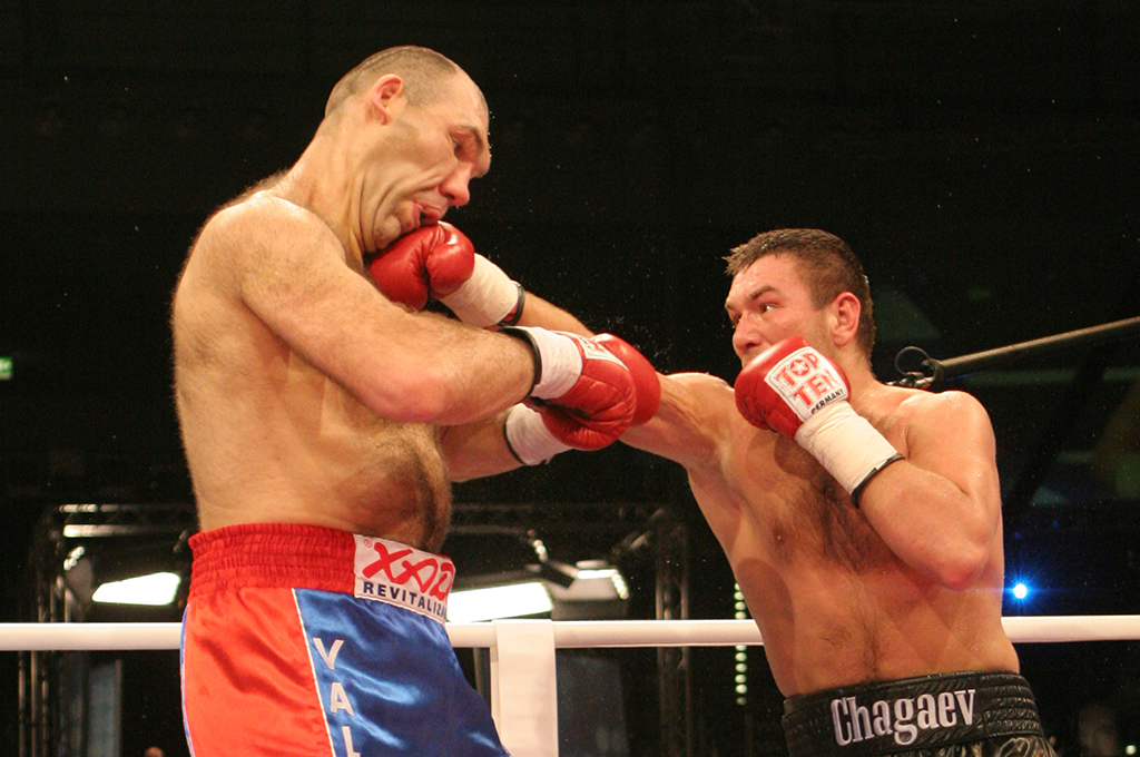 Ruslan Tschagajew im WM-Kampf gegen Nikolai Walujew.